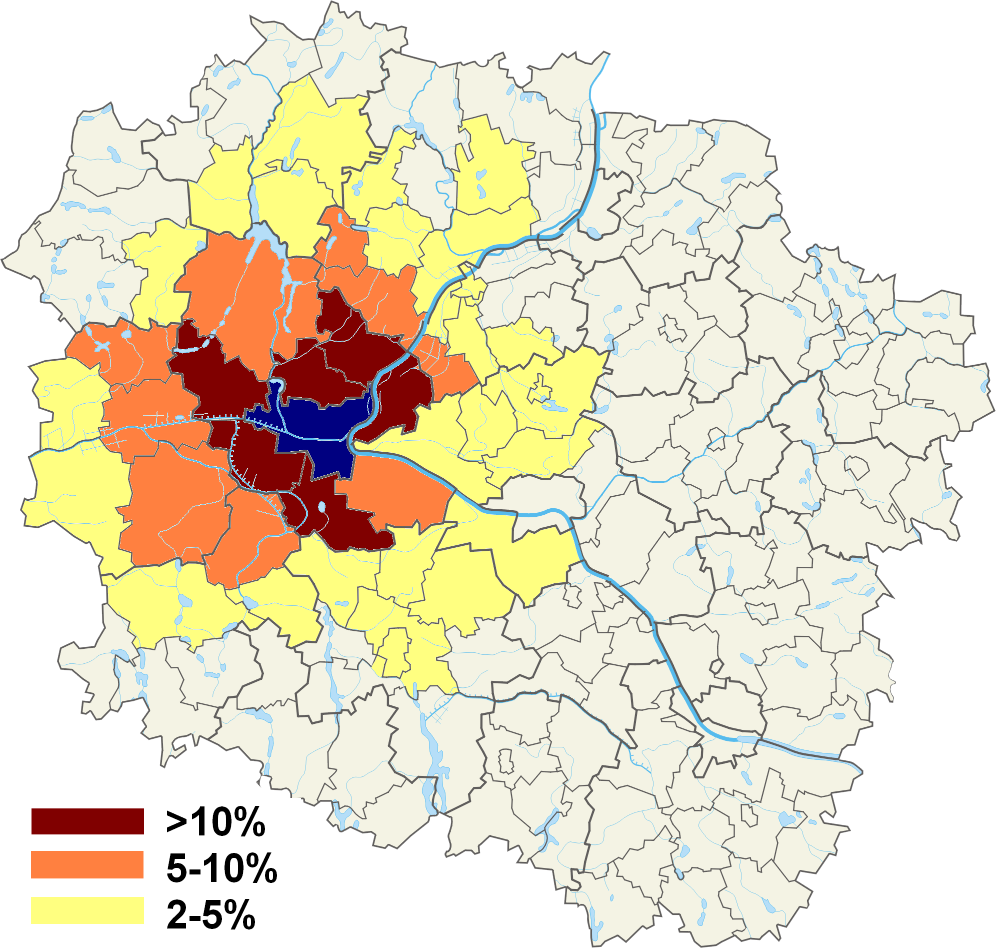 Dojazdy do pracy do Bydgoszczy według Narodowego Spisu Powszechnego 2011. Liczba osób zatrudnionych w Bydgoszczy w stosunku do liczby ludności w wieku produkcyjnym w gminach (%). Opracowane na podstawie: "Delimitacja i charakterystyka obszaru realizacji instrumentu Zintegrowanych Inwestycji Terytorialnych w obszarze funkcjonalnym Bydgoszczy i Torunia. Zarząd Województwa Kujawsko-Pomorskiego. marzec 2014"